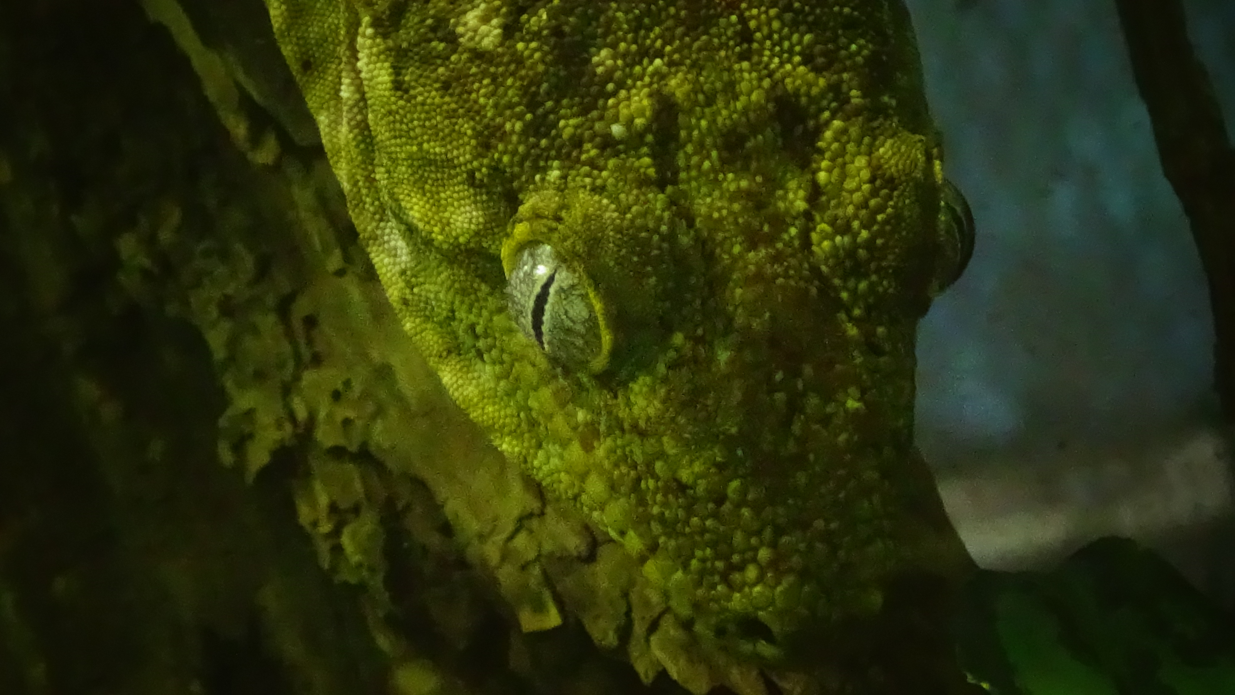 Rhacodactylus leachianus - gecko geant de nouvelle caledonie -Cedric Loury - wiki12